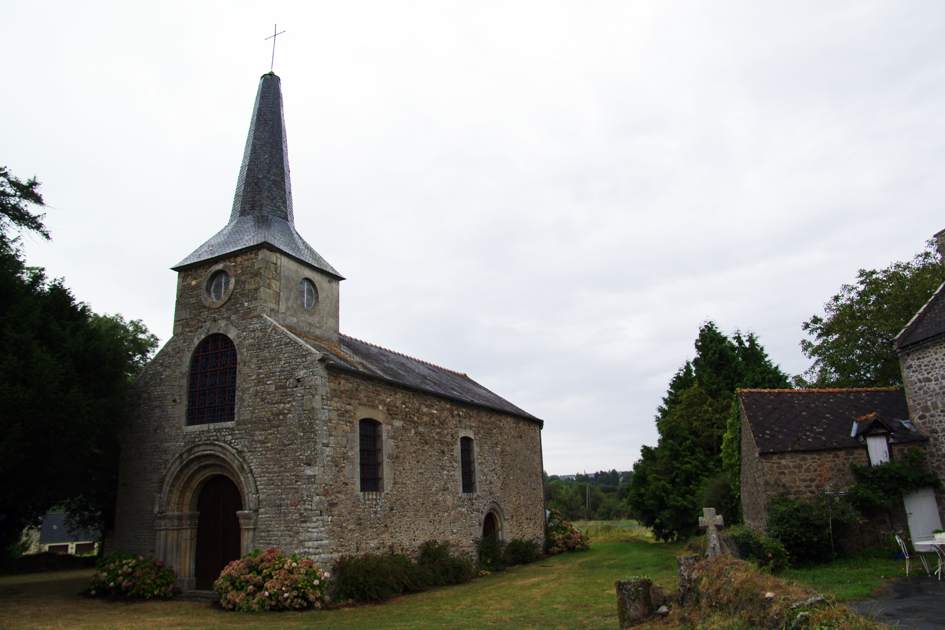 Ancienne église Saint-Lunaire, (Inscription, 1964) .